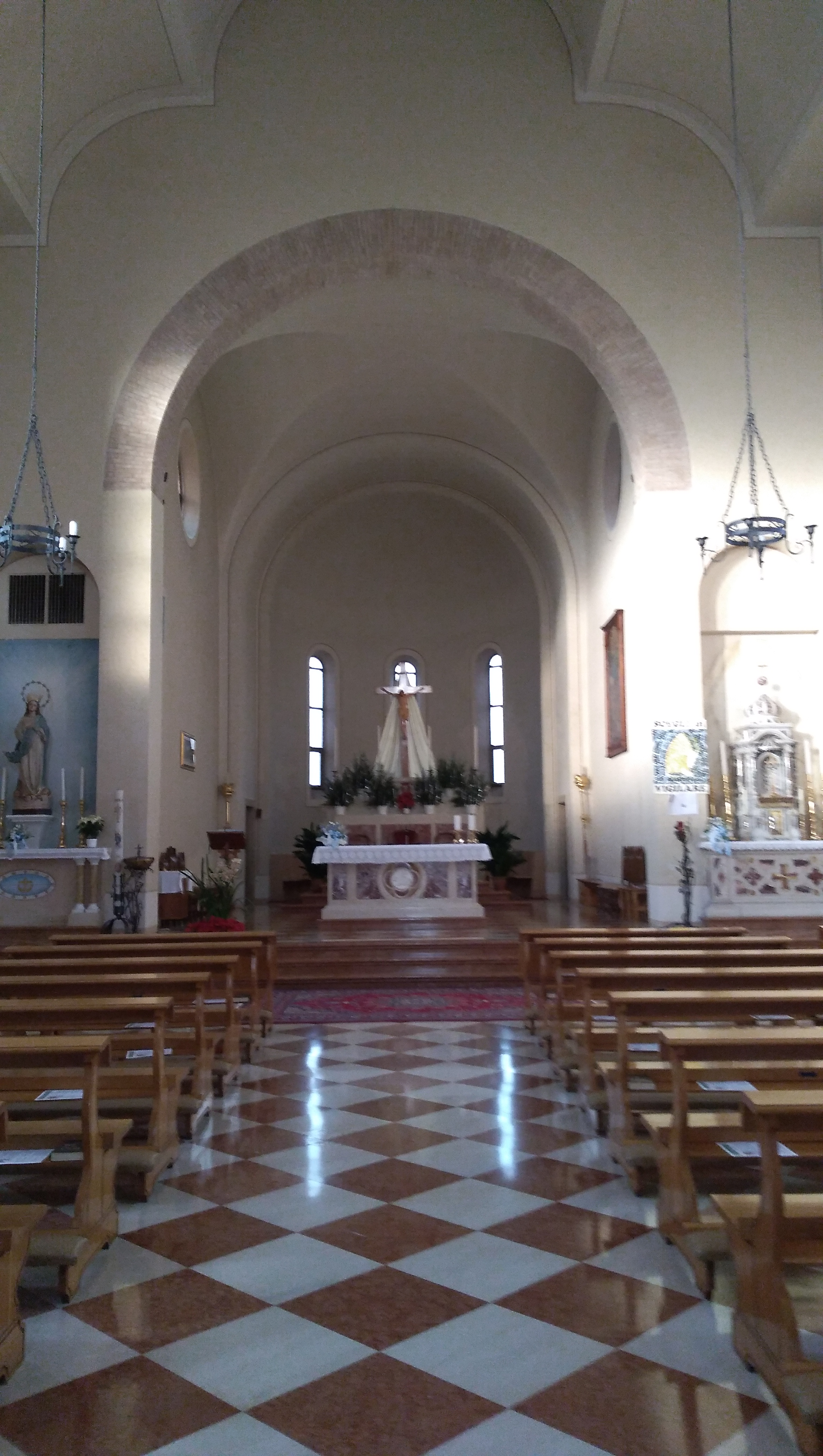 Veduta della navata centrale della chiesa